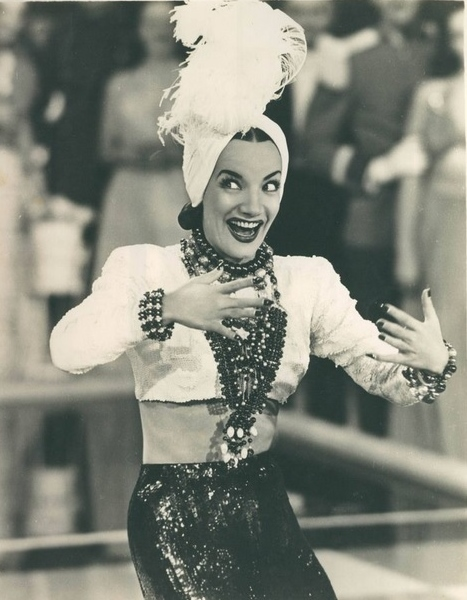 Carmen Miranda em cena do filme (em inglês That Night in Rio) Uma Noite no Rio de 1941.